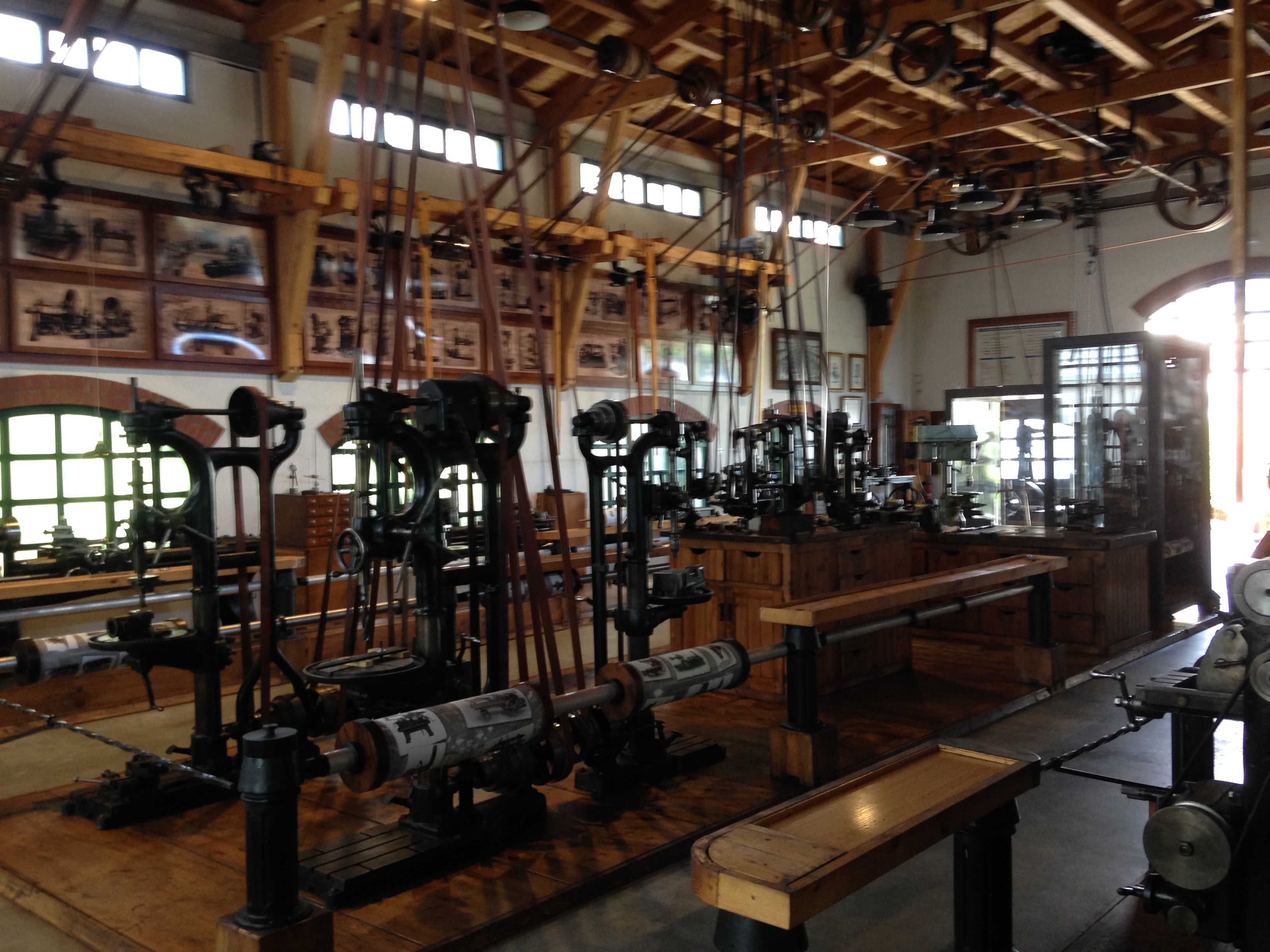 Museo de la maquina herramienta de Elgoibar (Gipuzkoa) País Vasco (España)